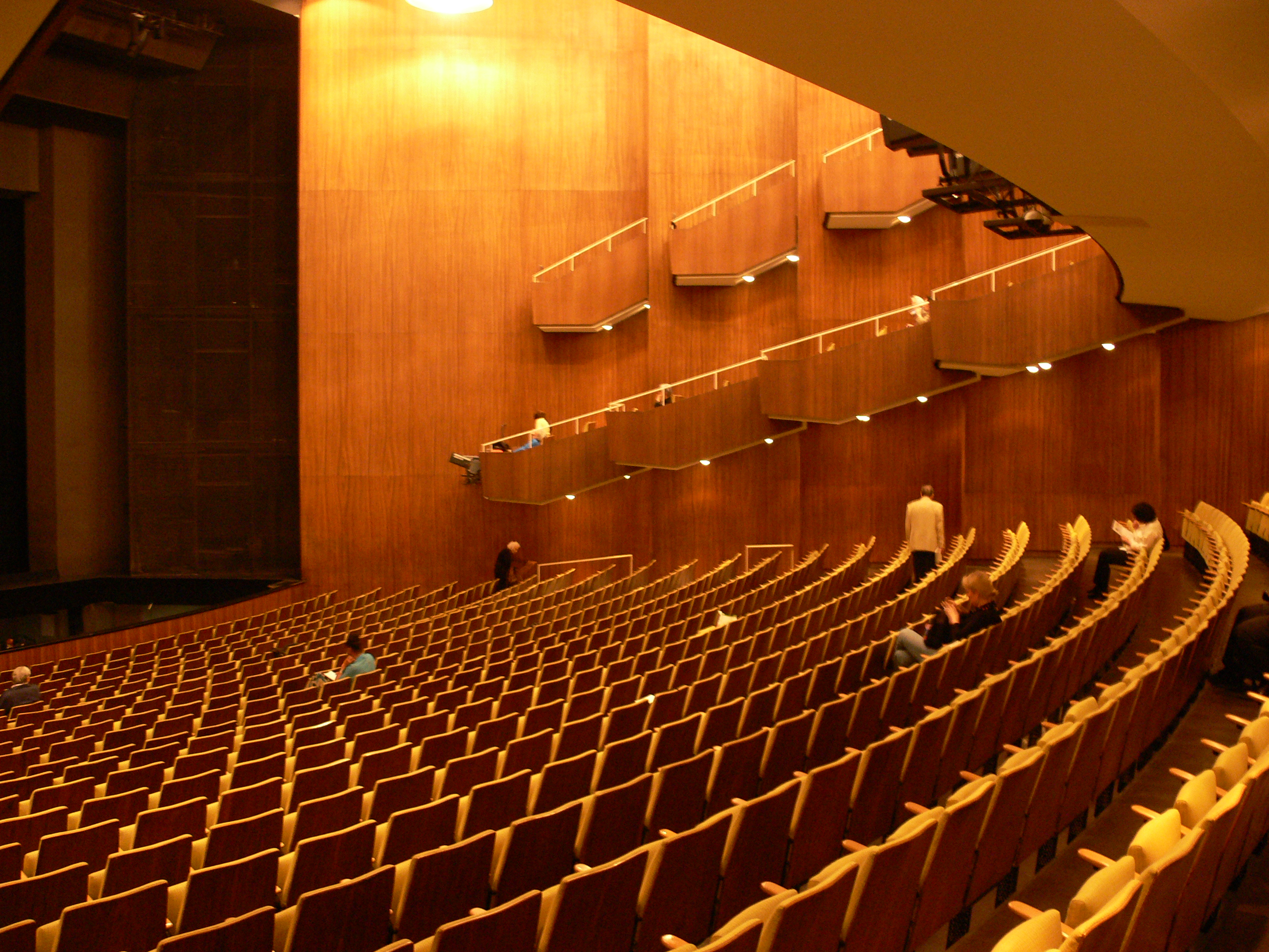 Berlin-Charlottenburg, Deutsche Oper Berlin, Zuschauerraum